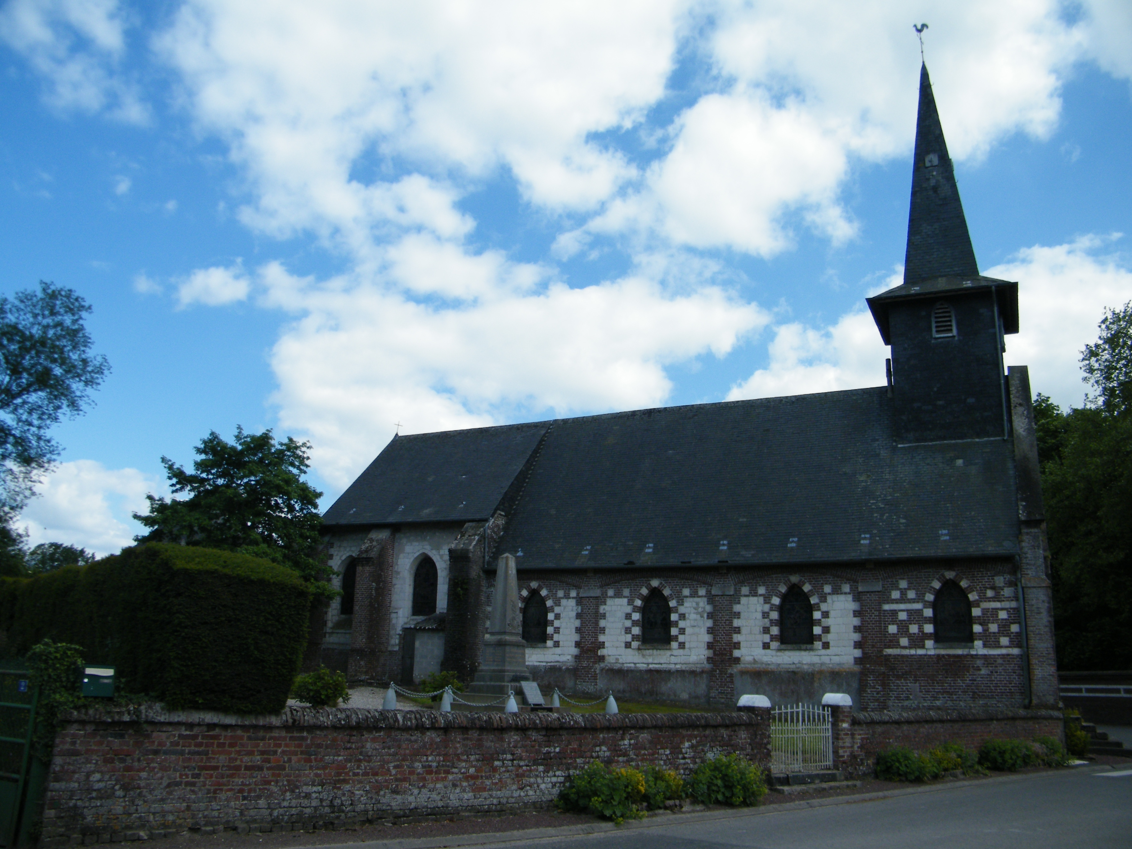 L'église de Baromesnil.